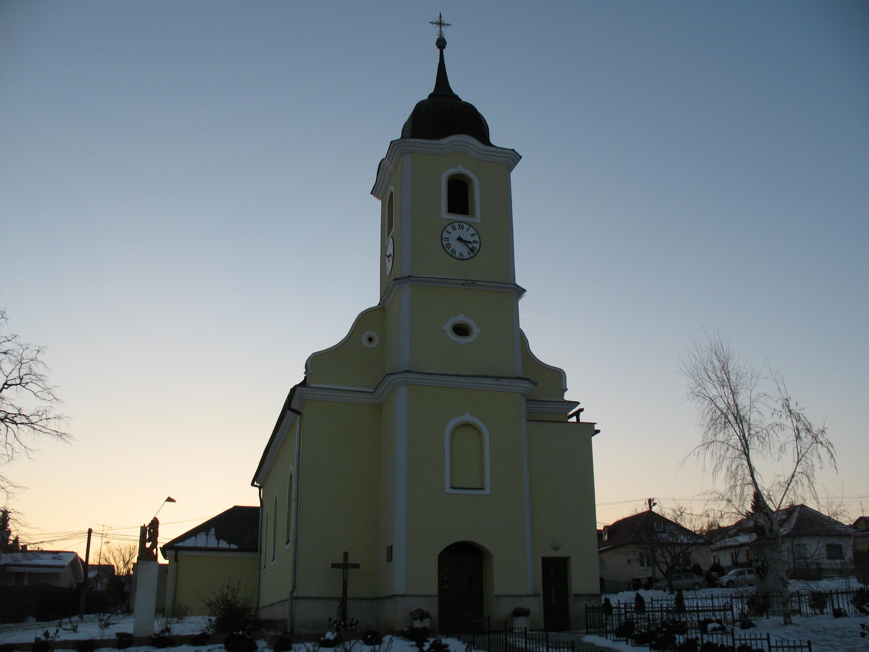 Nyitragerencsér